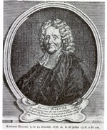 baluze